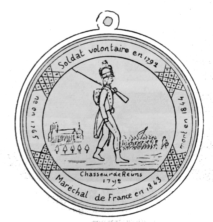 médaille en plomb frappée en 1849 à Reims, de la bibliothèque de Reims.